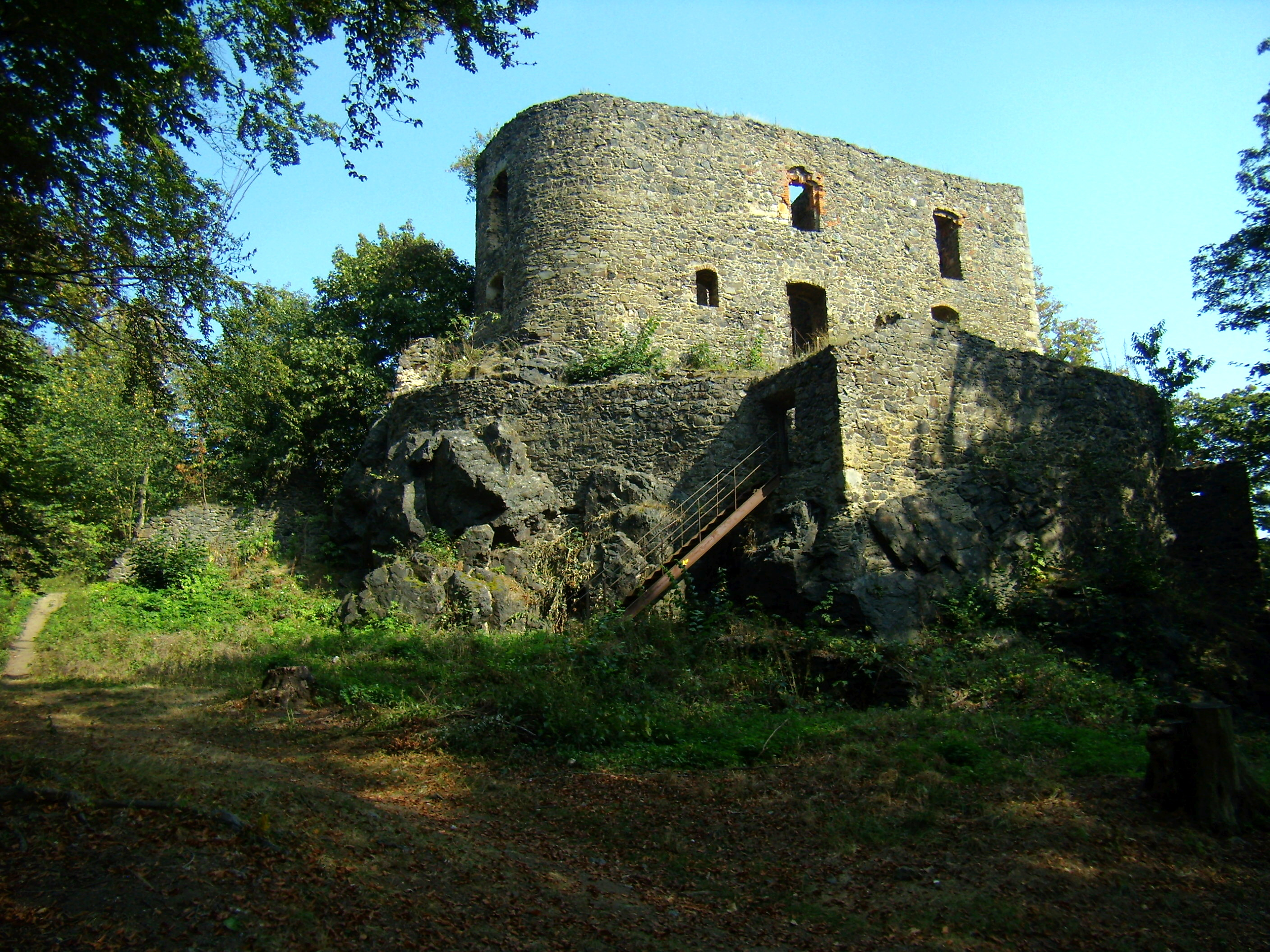 Vlčtejn